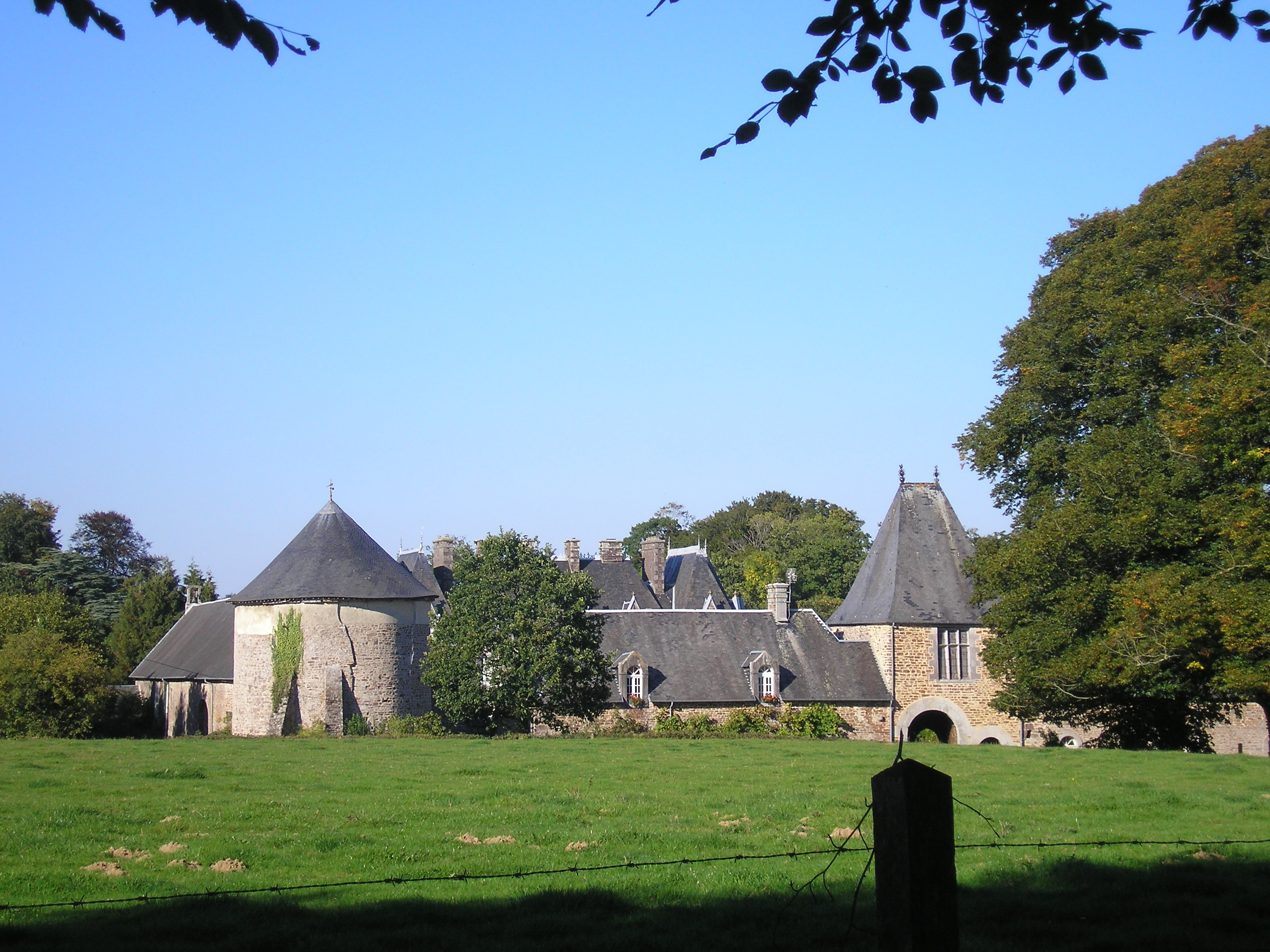 Notre-Dame-de-Cenilly (Normandie, France). Le château de Marcambye.